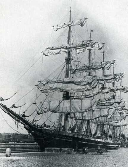 Segelschiff Kobenhaven, in Sack und Asche Fotograf: unbekannt